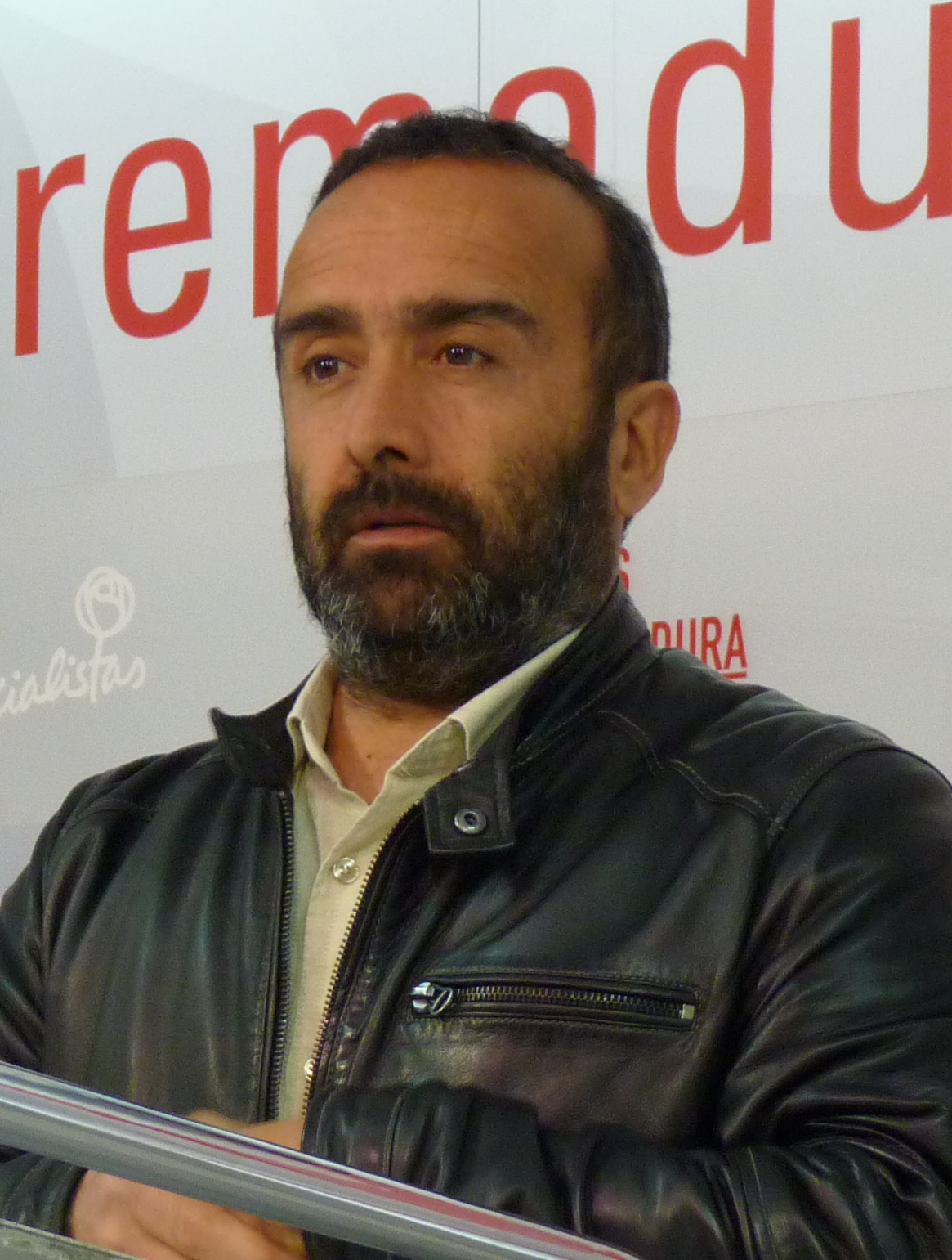 Mérida, 13 de marzo de 2017